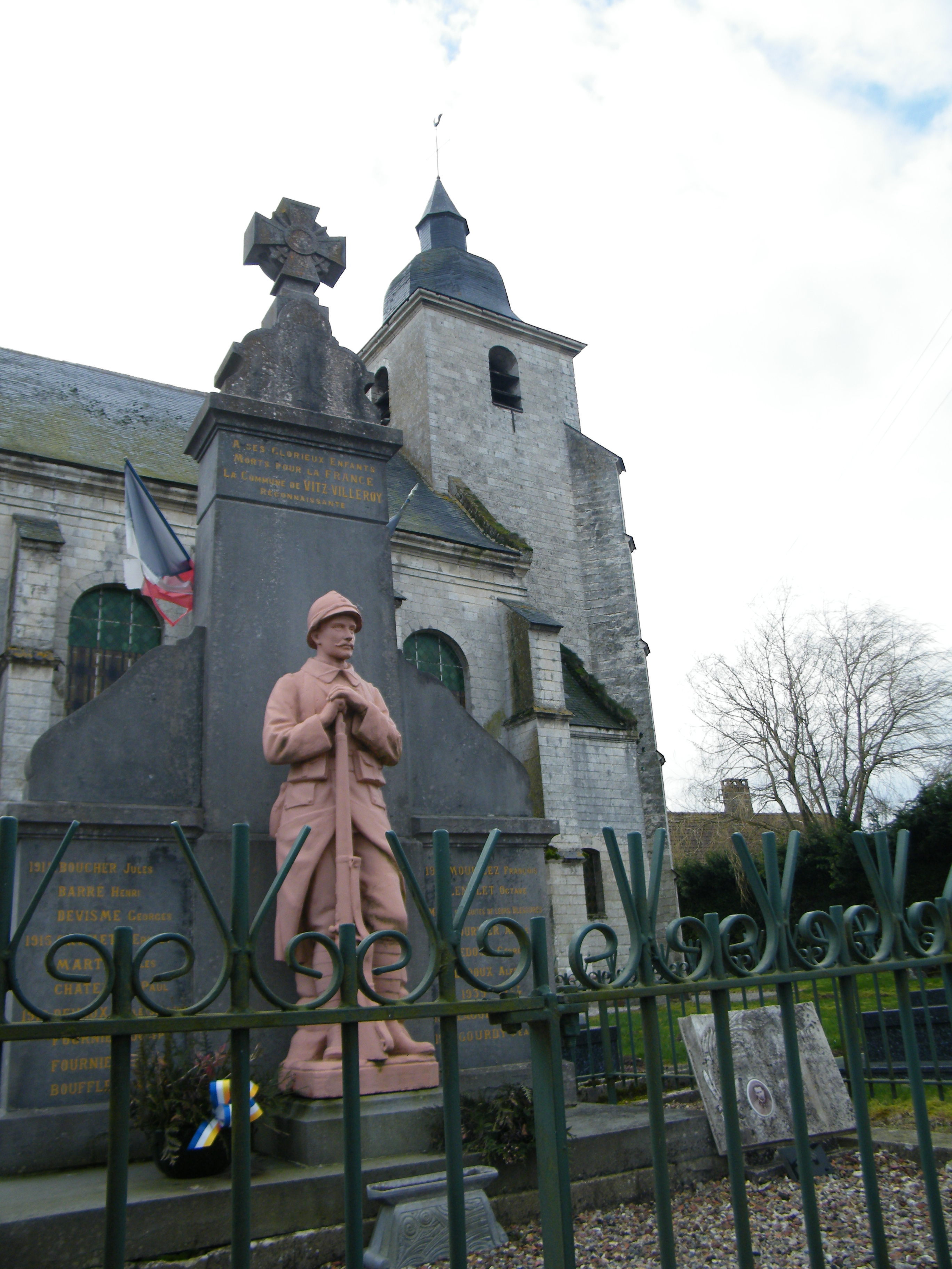 Monument